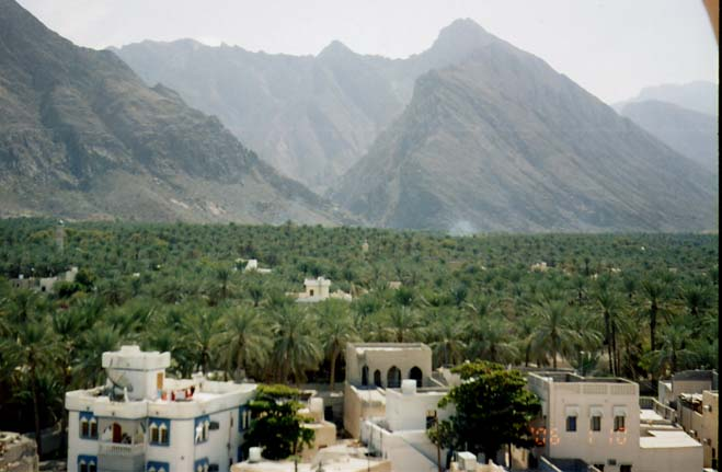 مزارع النخيل في سفح قلعة نخل بمنطقة جنوب الباطنة- سلطنة عمان. Nakhal palm tree farms- Batina Region -Sultanate of Oman.